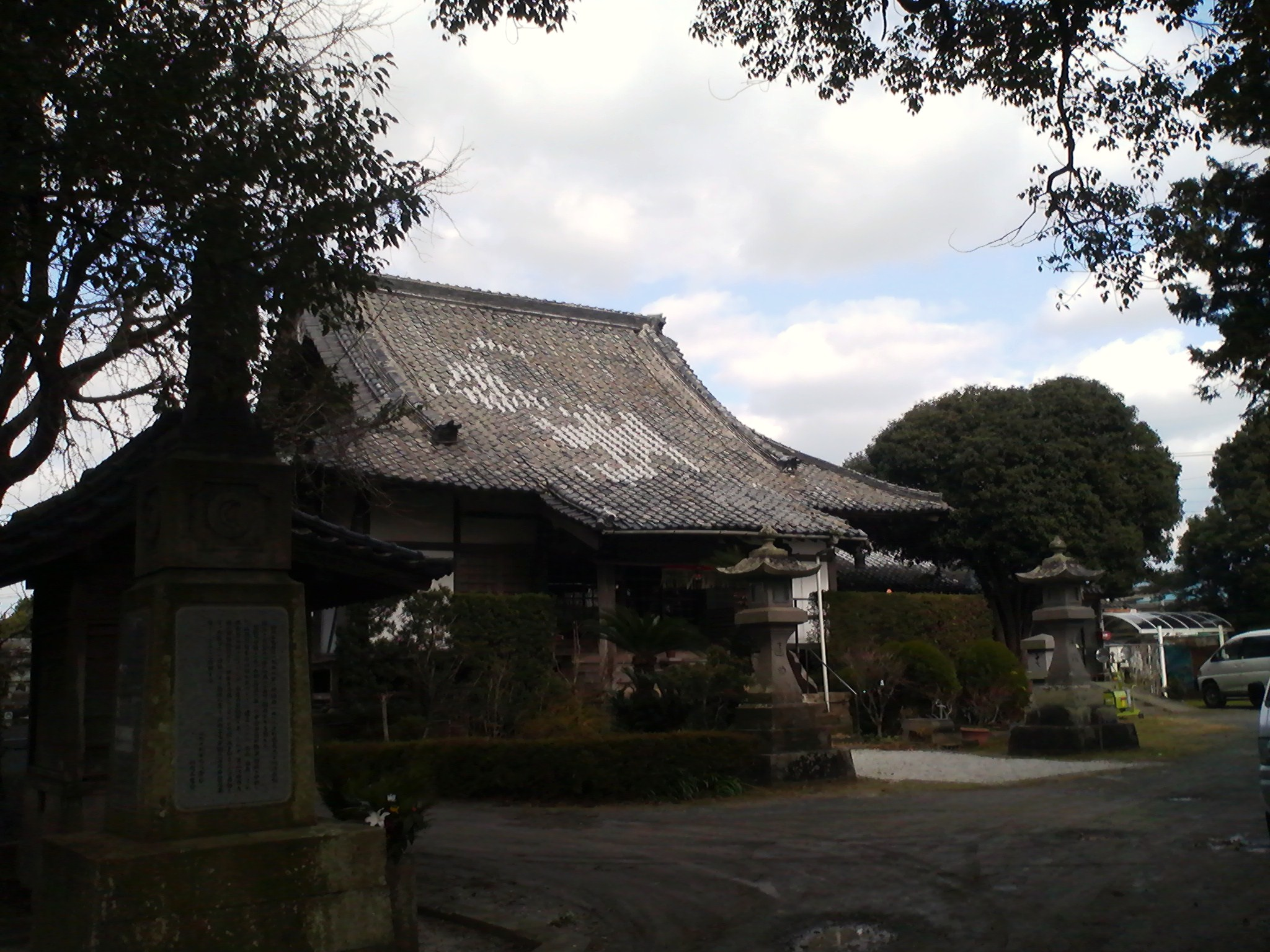 泰平寺 (薩摩川内市)の外観。